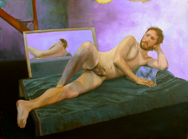 Artist Ora Ruven, Man 2, 120x90 cm, oil on canvas, 2010, an item from the series "Naked Men"